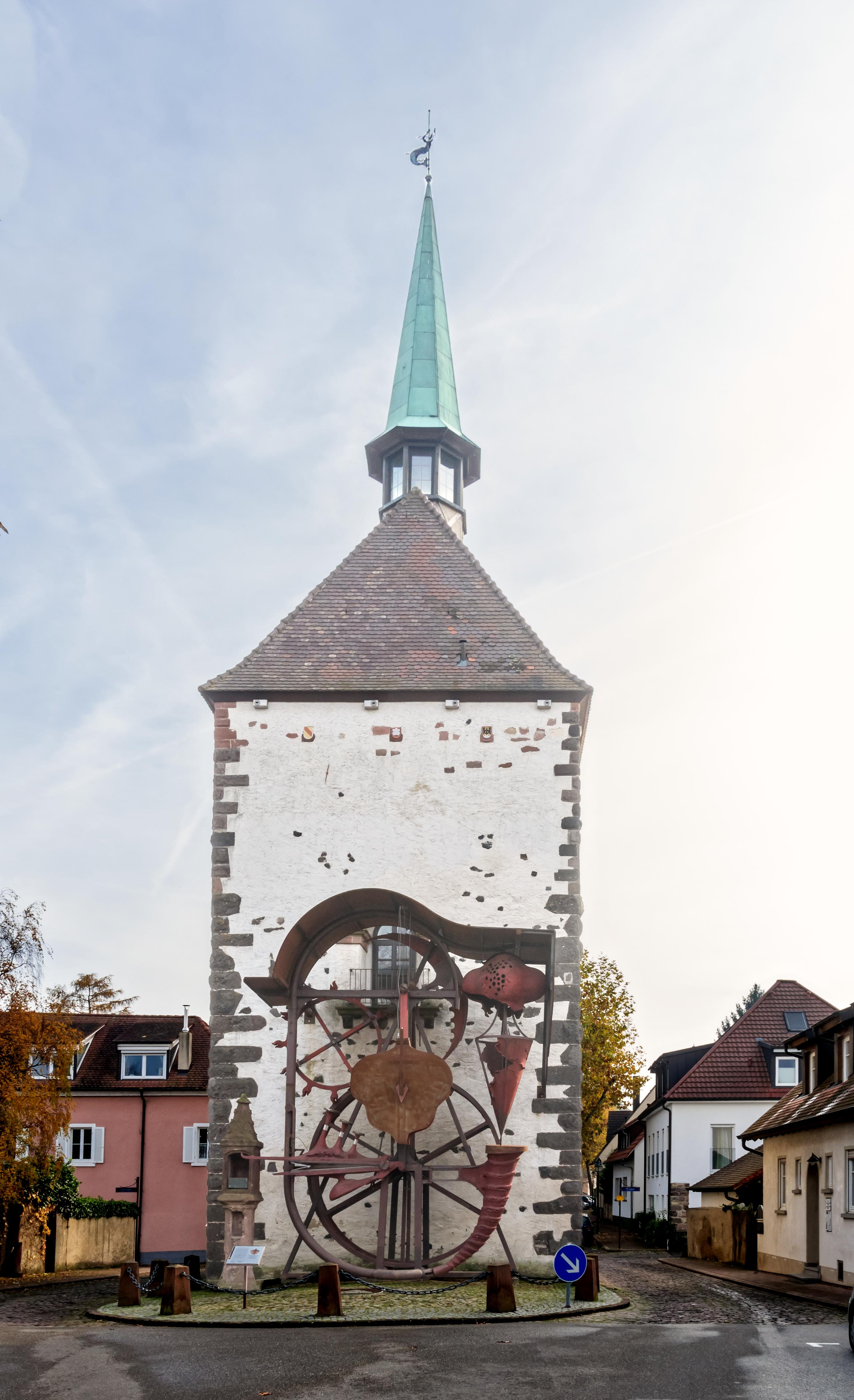 Bilder aus Breisach am Rhein Der Münsterberg Das Kunstwerk Die Radbühne, geschaffen vom Breisacher Künstler Helmut Lutz wurde im Herbst 2012 durch die Stadt Breisach hier am Radbrunnenturm aufgestellt.